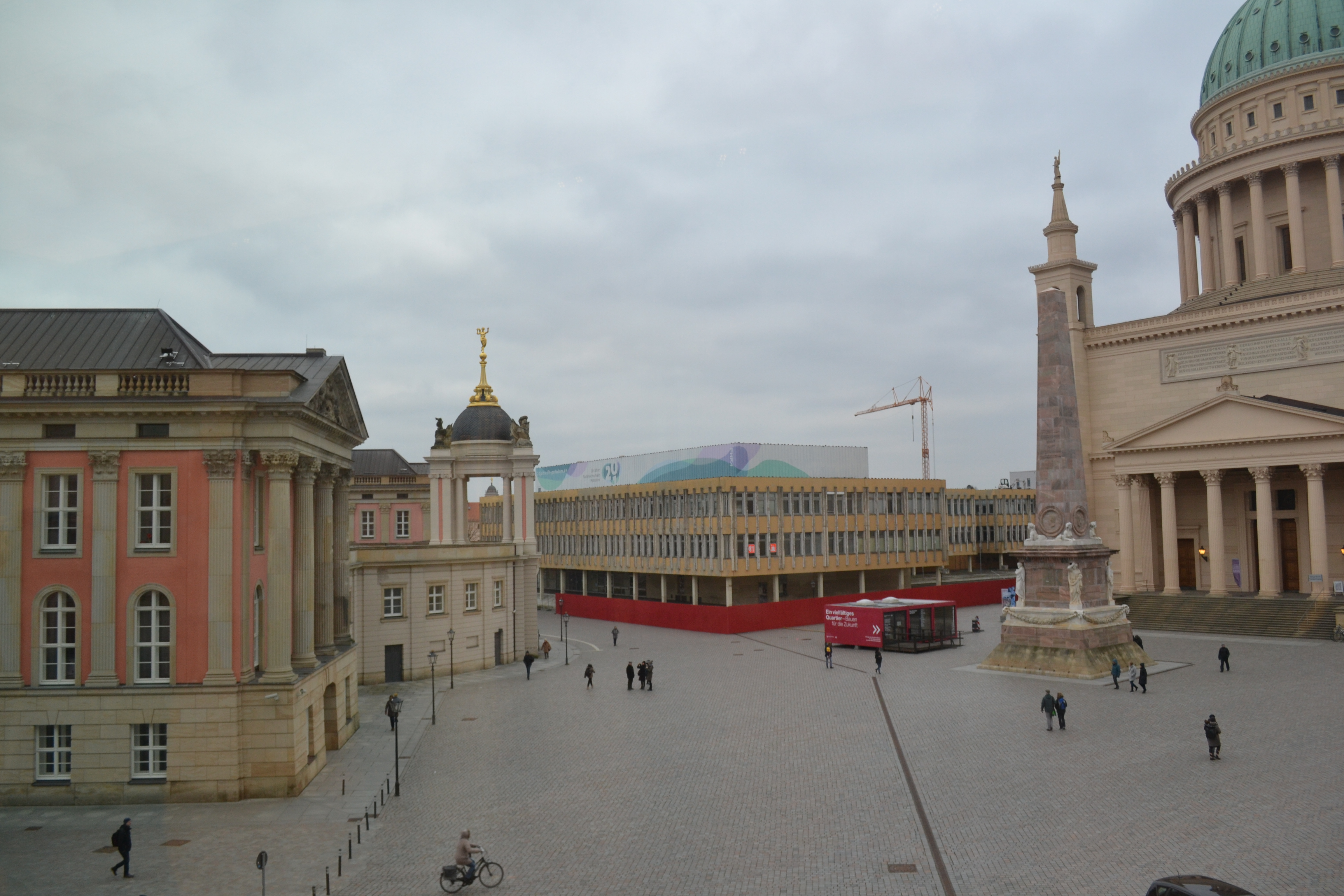 Blick auf den alten Markt in Potsdam